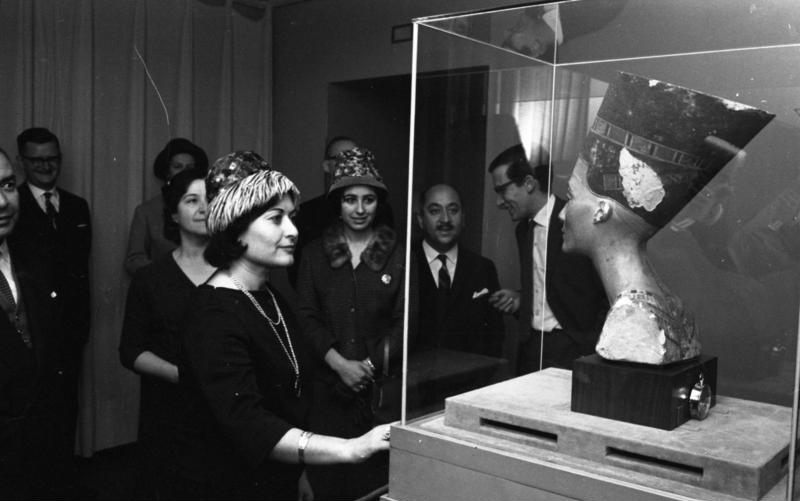 West-Berlin, Staatsbesuch Zypern. Vizepräs. Kutchuk Im Museum Dahlem (West Berlin, a state visit Cyprus. Vizepräs. Kutchuk, The Dahlem Museum)